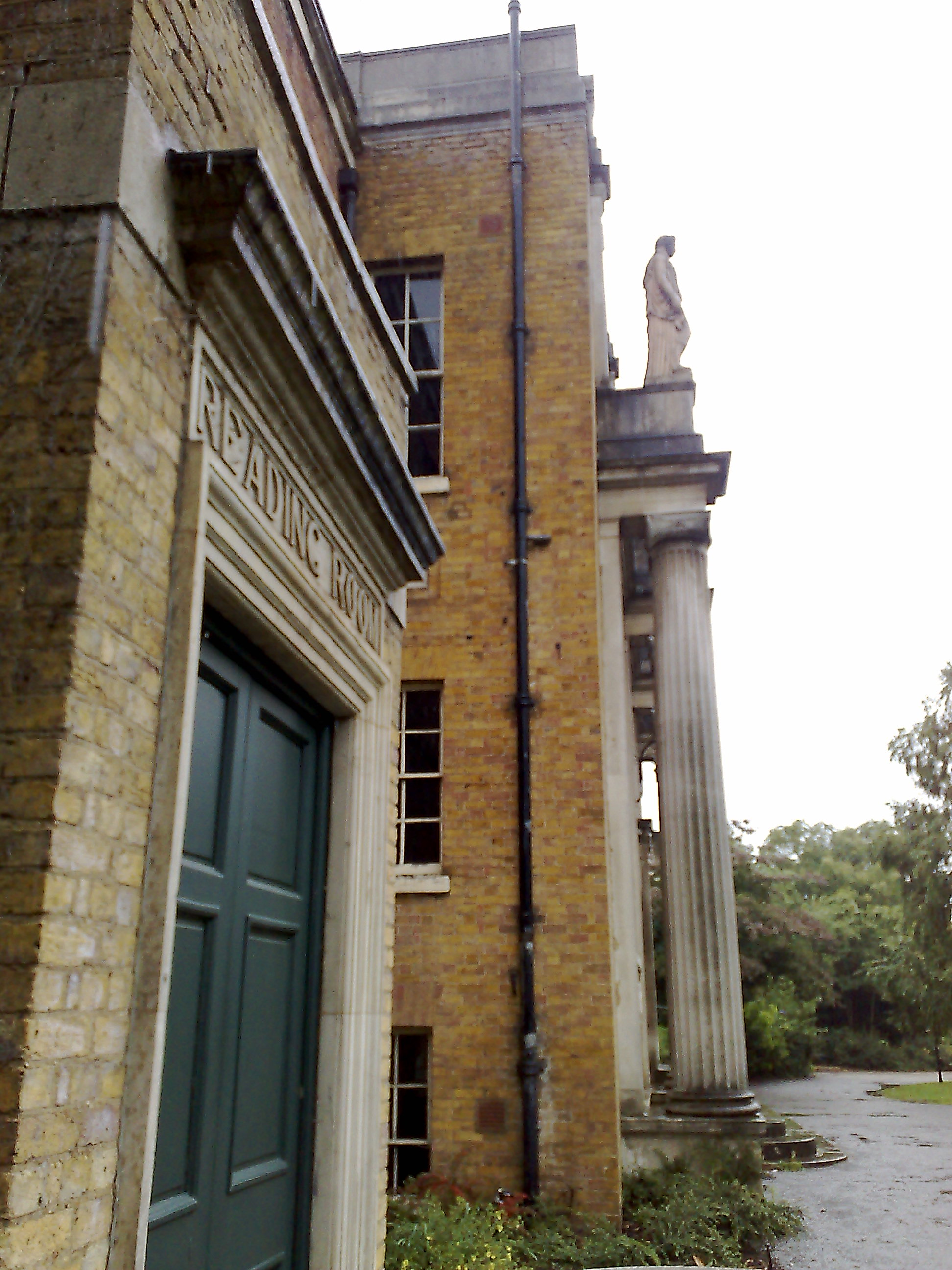 Reading room at Pitzhangar manor in Ealing